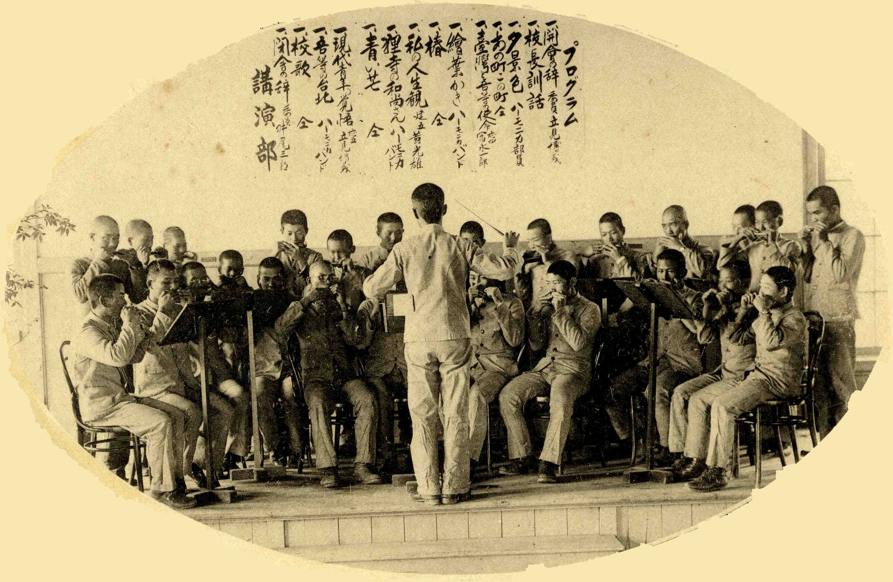 臺北州立臺北工業學校學生吹奏口琴。